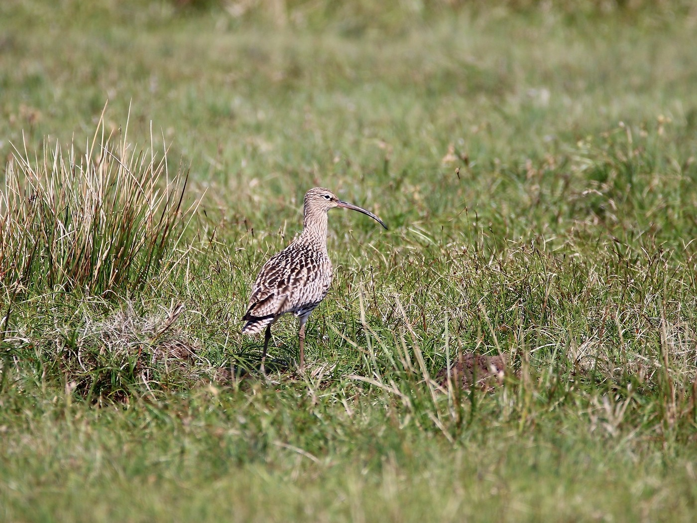 Großer Brachvogel im südlichen Mecklenburg